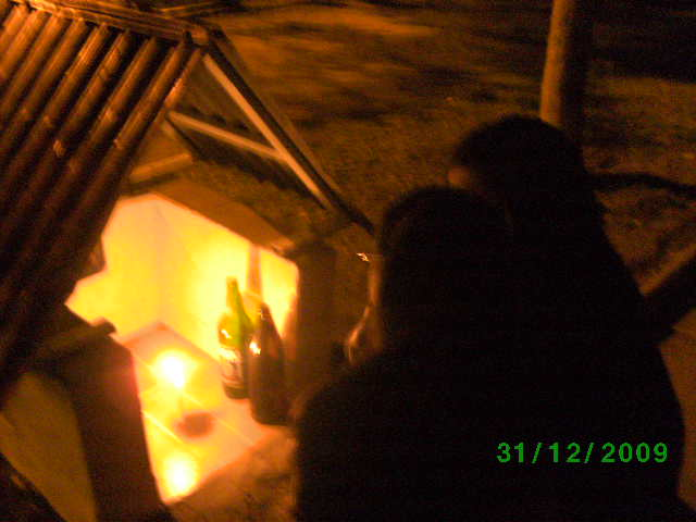 Familiares y amigos visitan animita de joven perteneciente a Barra Brava de Colocolo atropellado durante año nuevo. Rojas Magallanes con Manutara, La Florida, Santiago de Chile